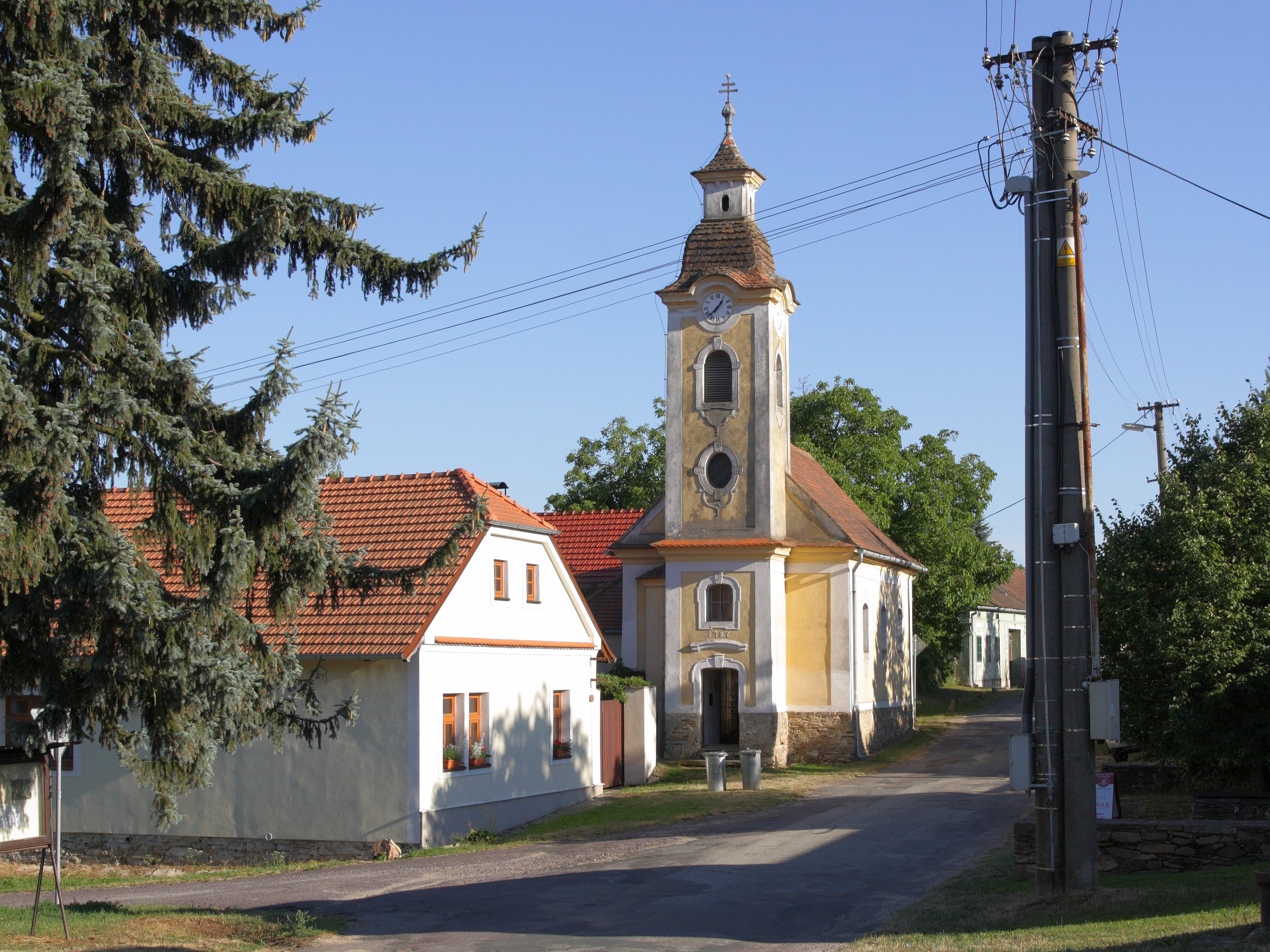 Čížov (Horní Břečkov) - centrum vsi s kaplí.